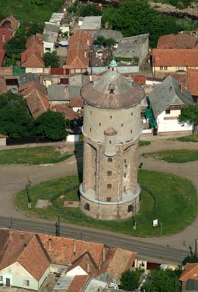 Víztorony - Gyöngyös - Hungary - Europe